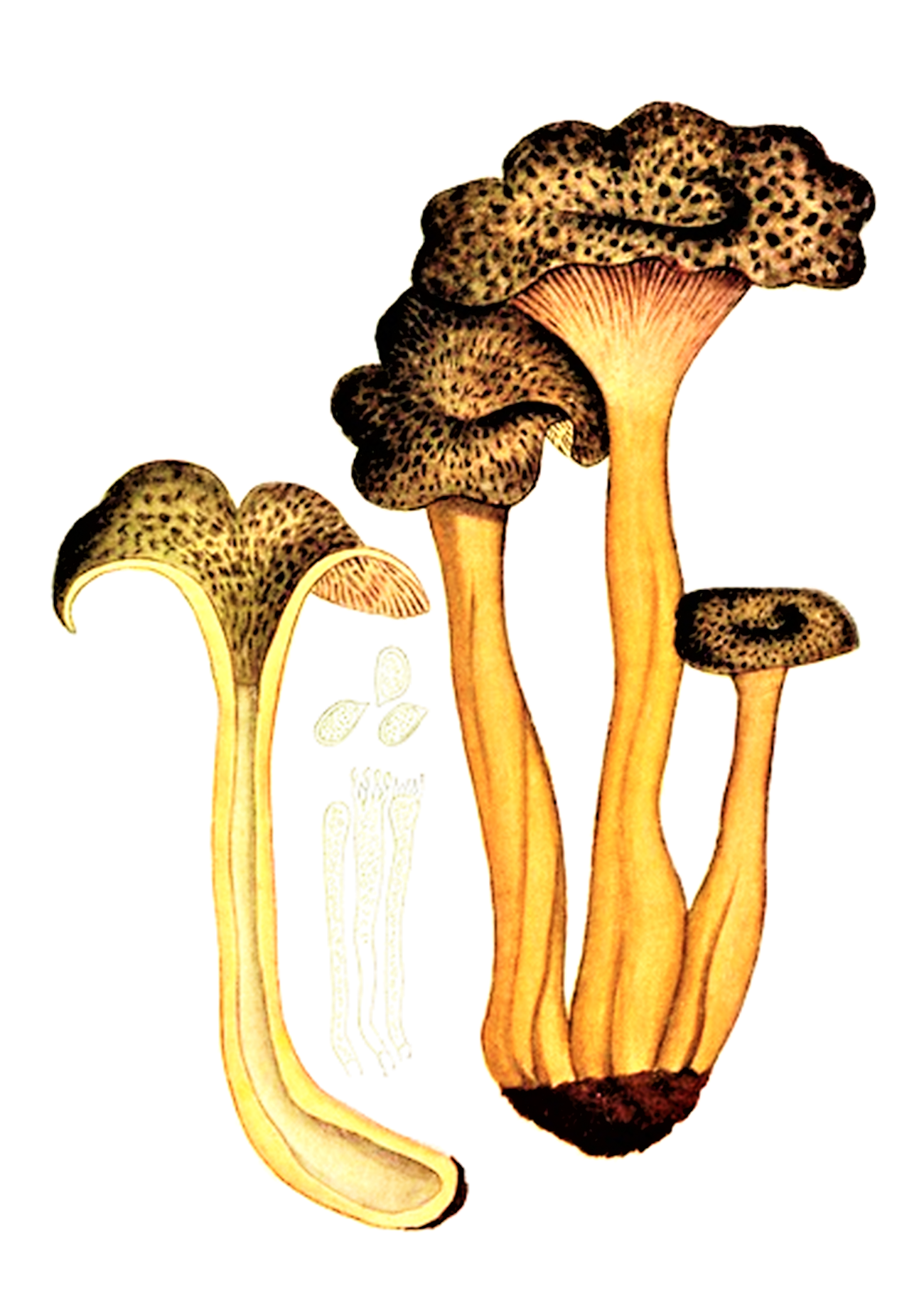 Giacomo Bresadola: Cantharellus lutescens (1929)